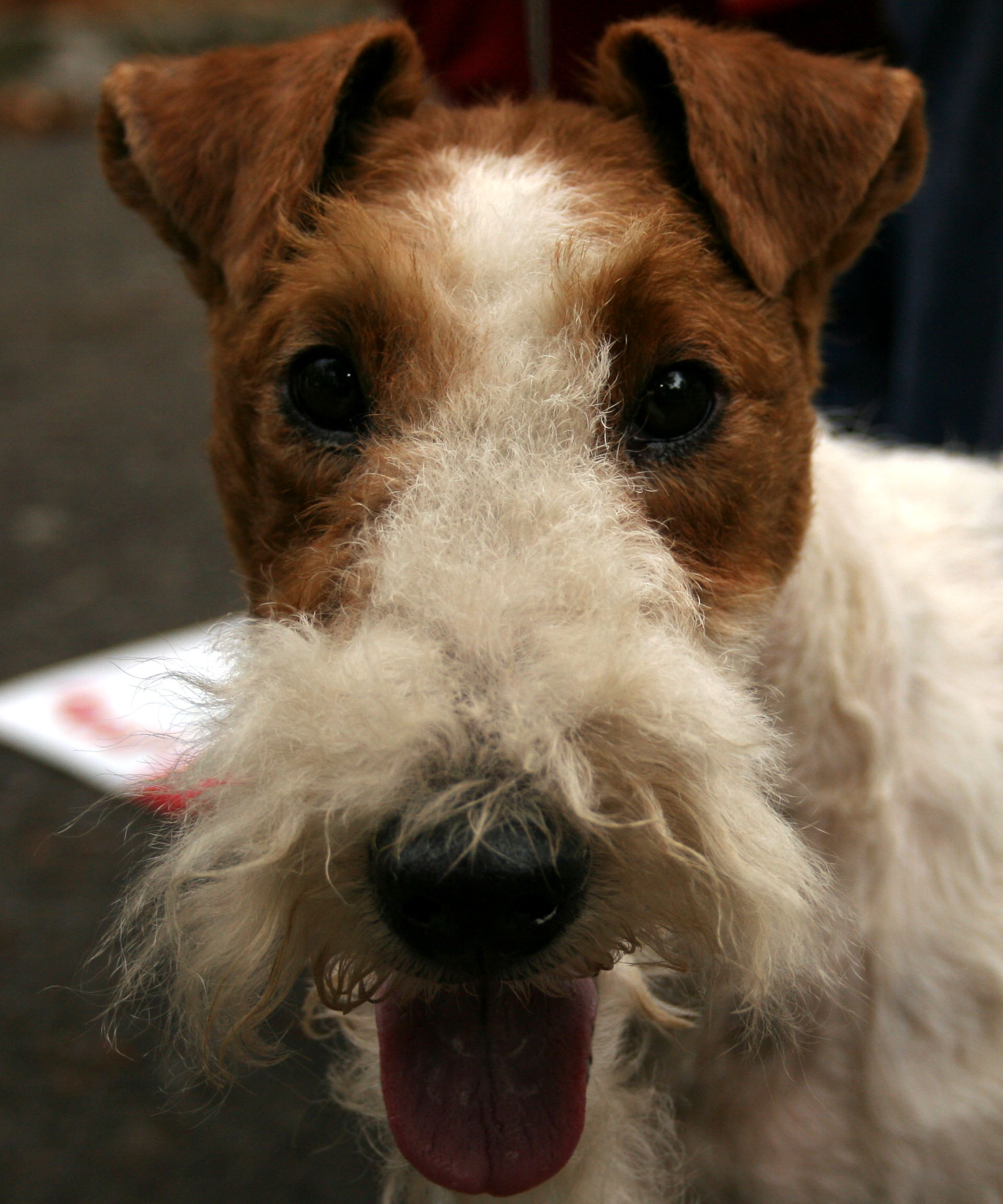 Foksterier_szorstkowłosy na wystawie krajowej w Rybniku - Kaminiu